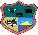 Escudo de Juan de Acosta